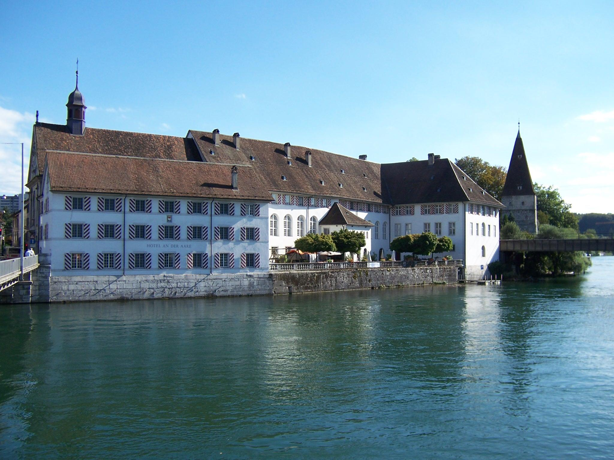 Rechtes Ufer der Aare in Solothurn (Kanton Solothurn, Schweiz) mit Altem Spital, Spitalkirche und Krummturm eigene Aufnahme vom 4. September 2006